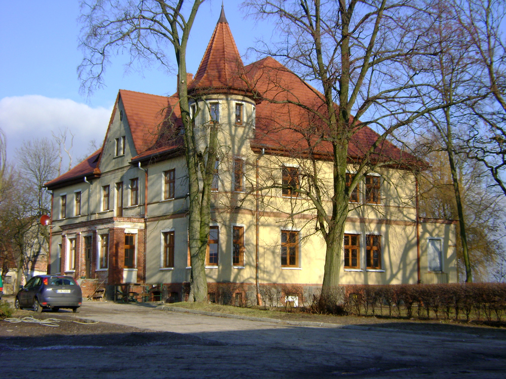 Wierzchosławice - dwór